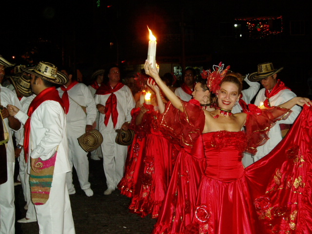 Cumbiamba La Pollera Colora. 7 de diciembre 2005. Carnaval de Barranquilla